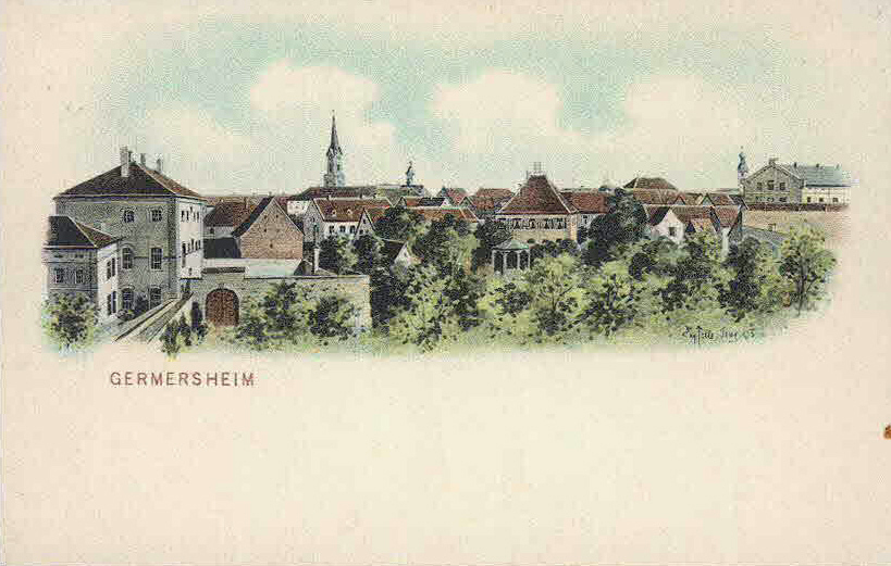 Ansichtskarte von Eugen Felle; Technoseum (Landesmuseum für Technik und Arbeit Mannheim)Motiv: Germersheim